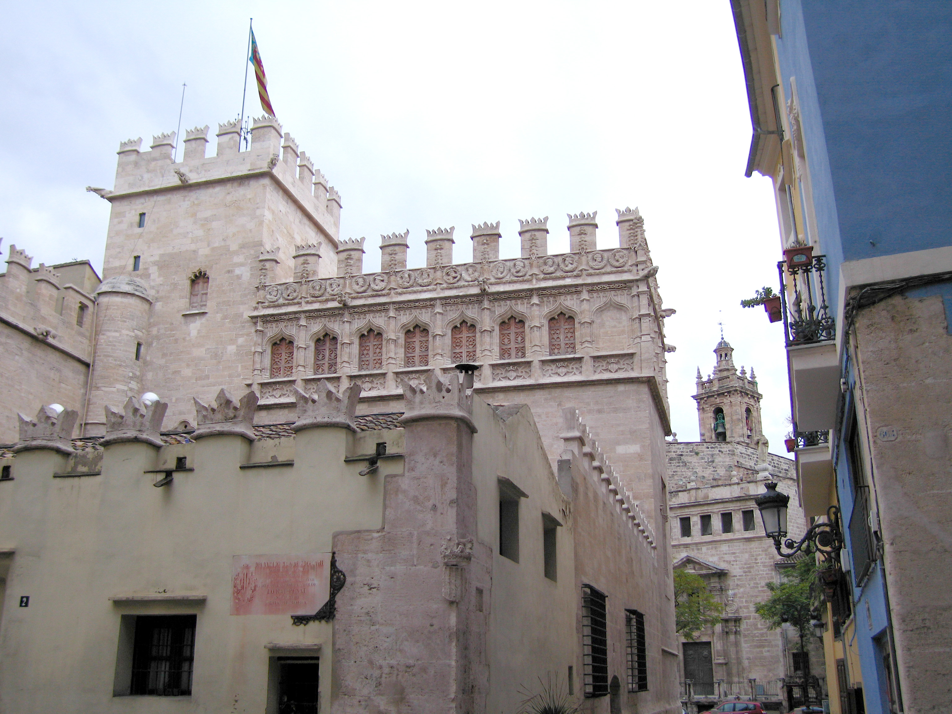 Part de darrere de la Llotja de la seda, València. Silk Exchange (Llotja de la Seda) from behind, Valencia.